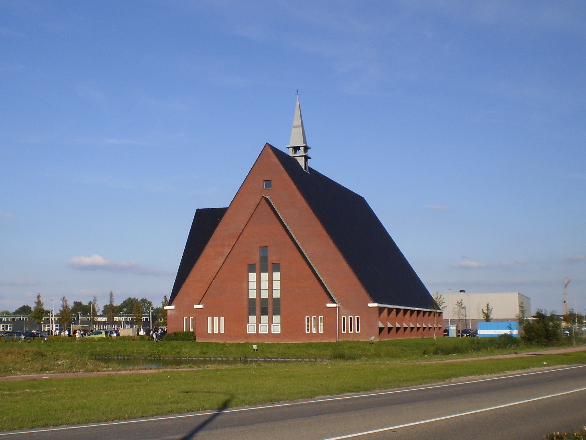 Kerkgebouw (2007) Gereformeerde Gemeente, Ploegwei, Barendrecht (NL)